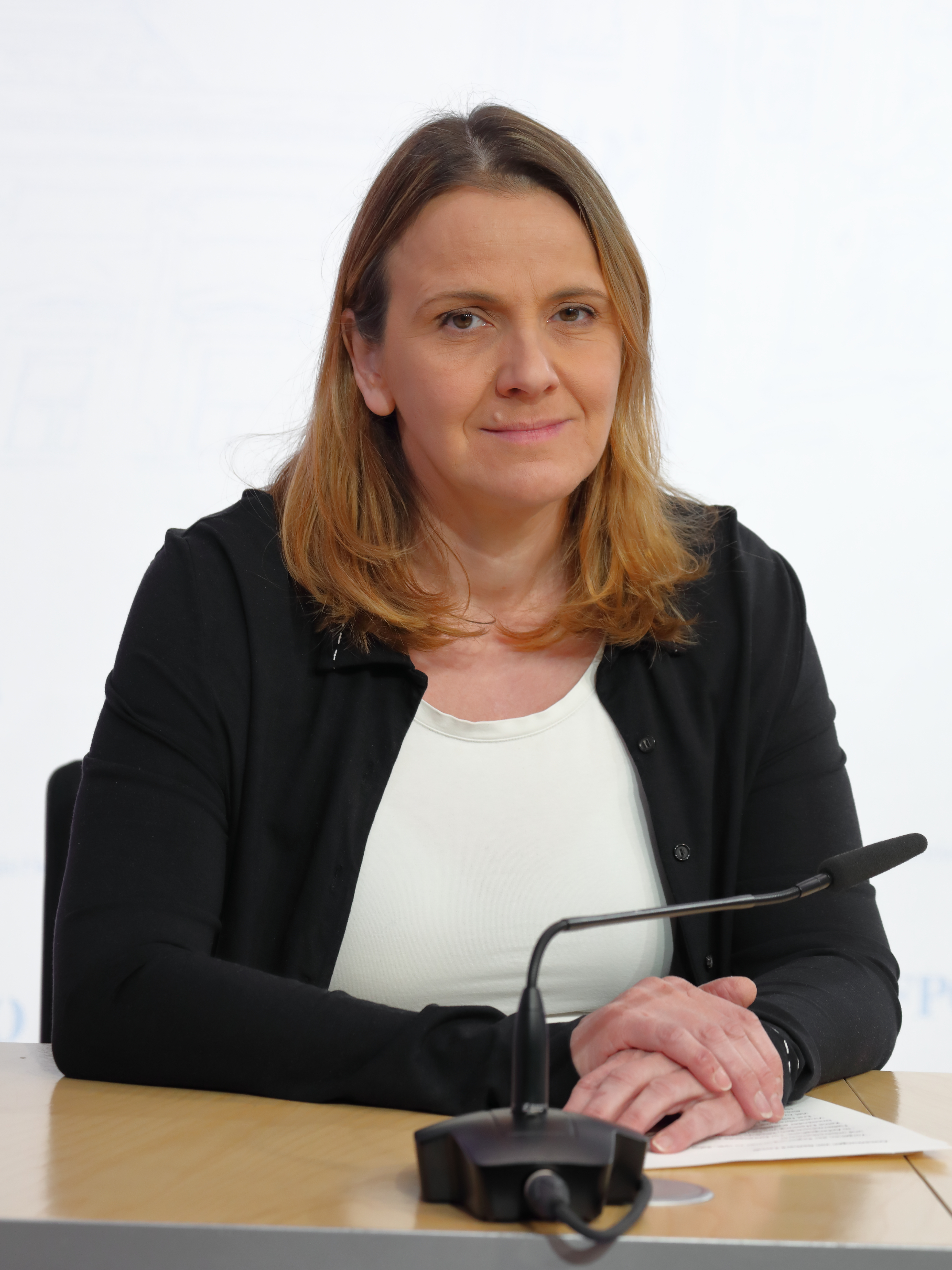 Die österreichische Politikerin Dagmar Belakowitsch bei einer Pressekonferenz am 13. März 2020 im FPÖ-Medienzentrum, Reichsratsstraße 7, im 1. Wiener Gemeindebezirk Innere Stadt.